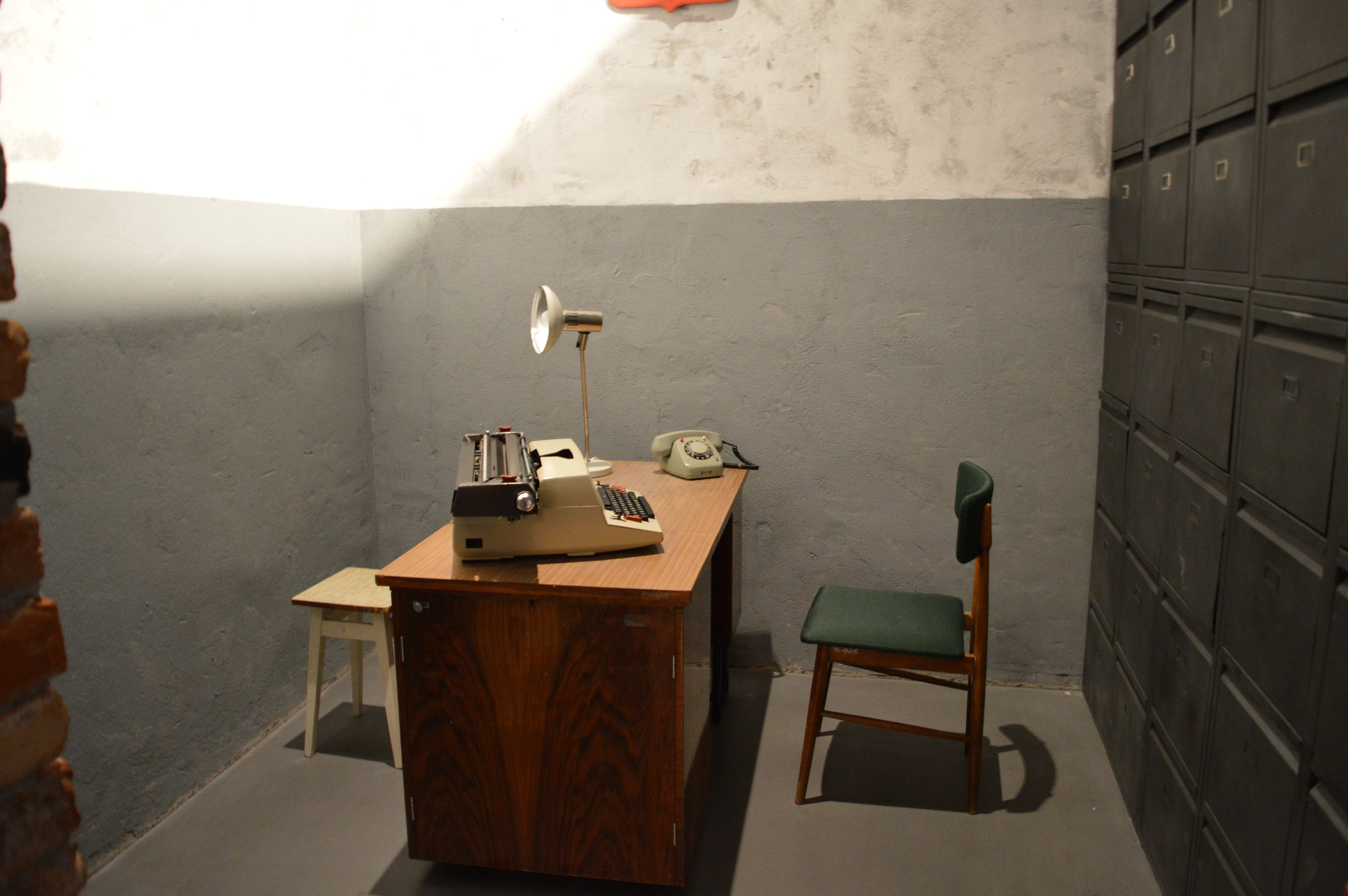 Europejskie Centrum Solidarności - sala B, milicyjne pomieszczenie przesłuchań